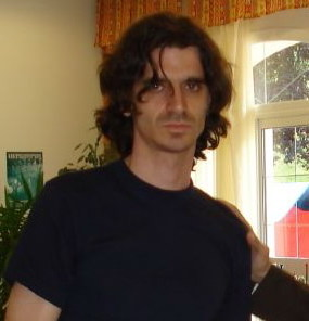 Gabriel del Rio (3r classificat), XXV Open Internacional d'Andorra 2007. Hotel St Gothard, Erts La Massana. Cloenda.